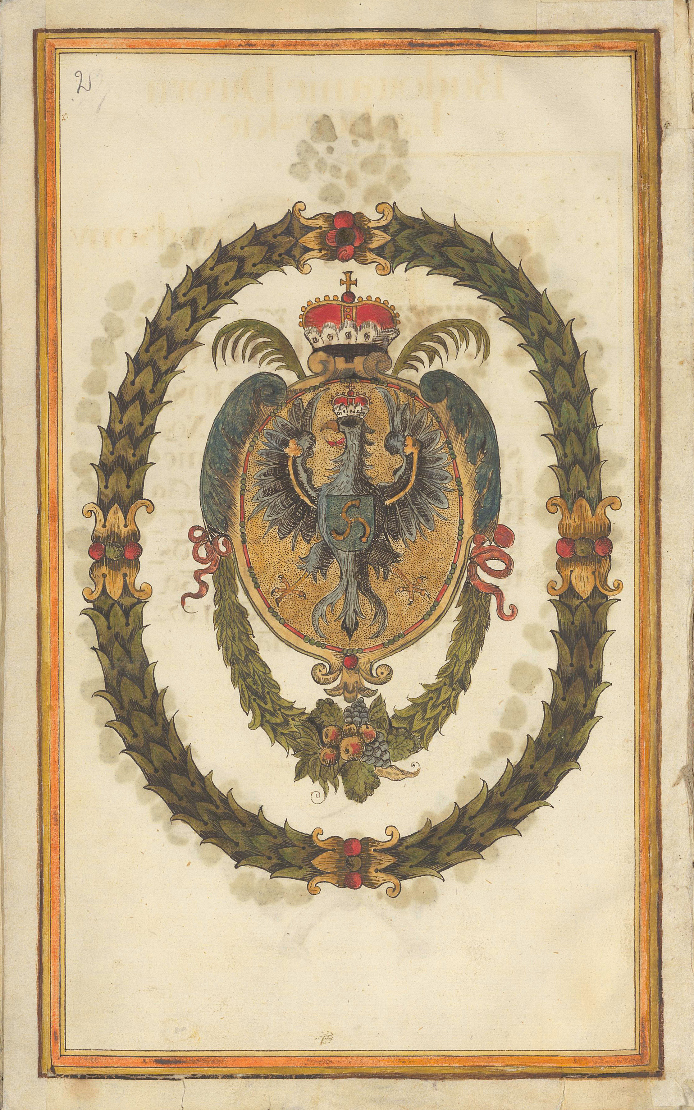 Беларуская (тарашкевіца): Герб Радзівілаў (Radzivił) Трубы (Truby) з інвэнтару маёнтку Лахвы